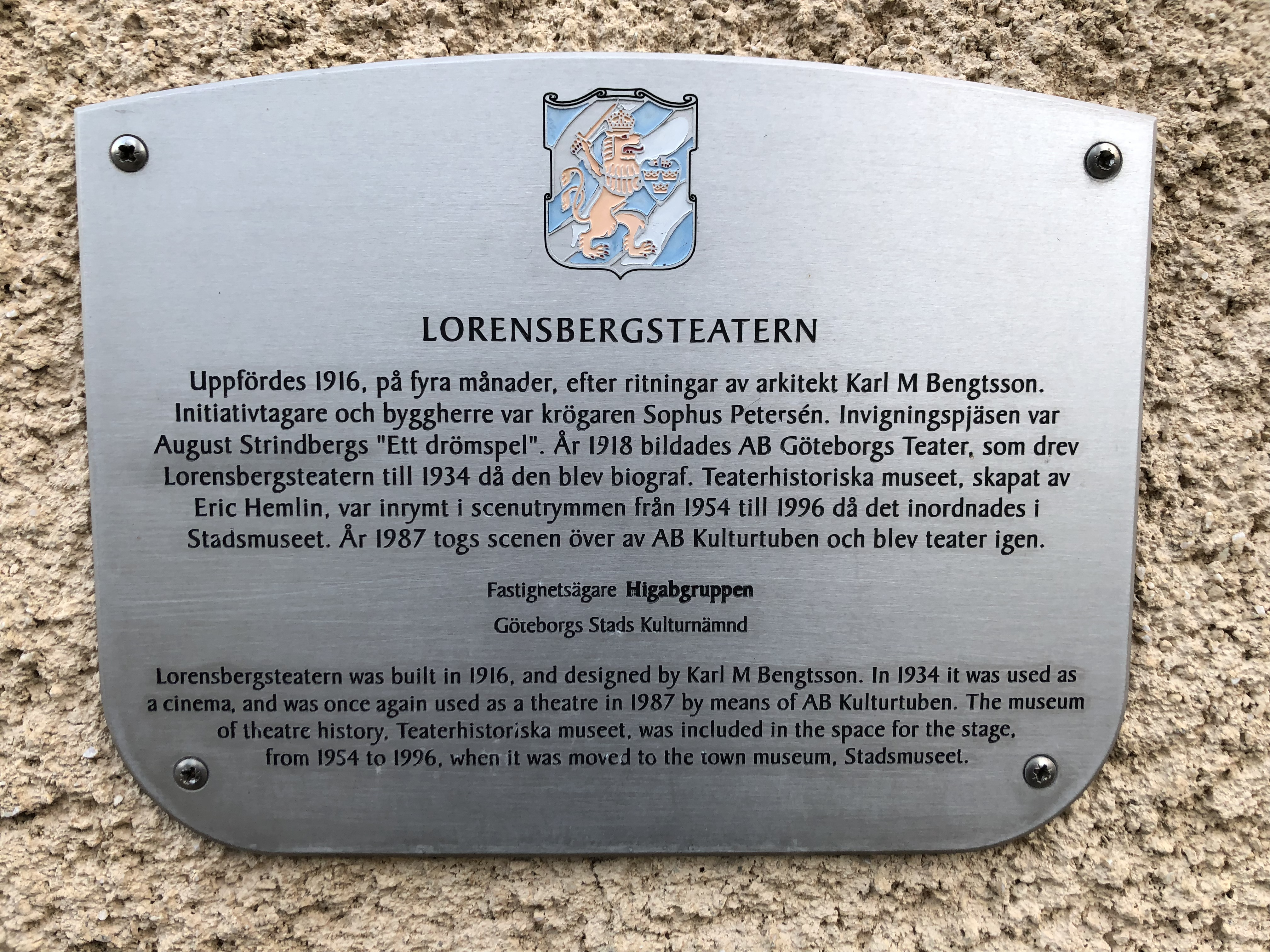 Kulturskylt på Lorensbergsteatern. Plaketten sattes upp som en del av Göteborgs stads kulturnämnds "Projekt Husmärkning" omkring åren 2000–2001 där drygt hundra skyltar ingick. Se även boken "100 utmärkta hus i Göteborg". Vid en inventering av kommunen gjord 2016 satt 69 skyltar fortfarande uppe.